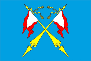 Флаг Сортавальского муниципального района Республики Карелия